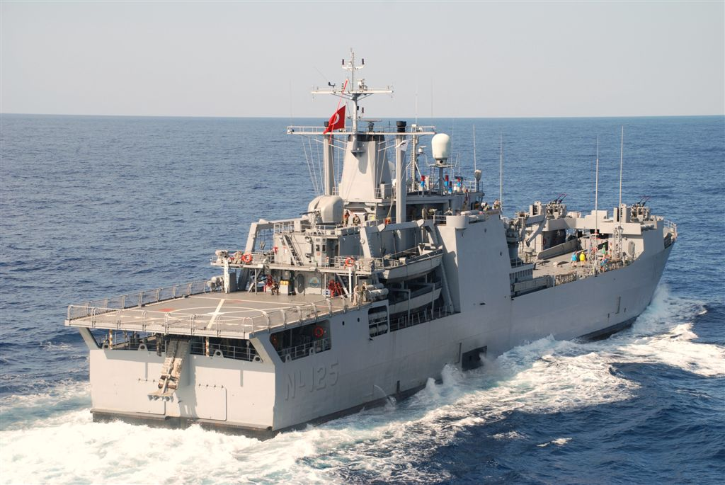 TCG Osmangazi